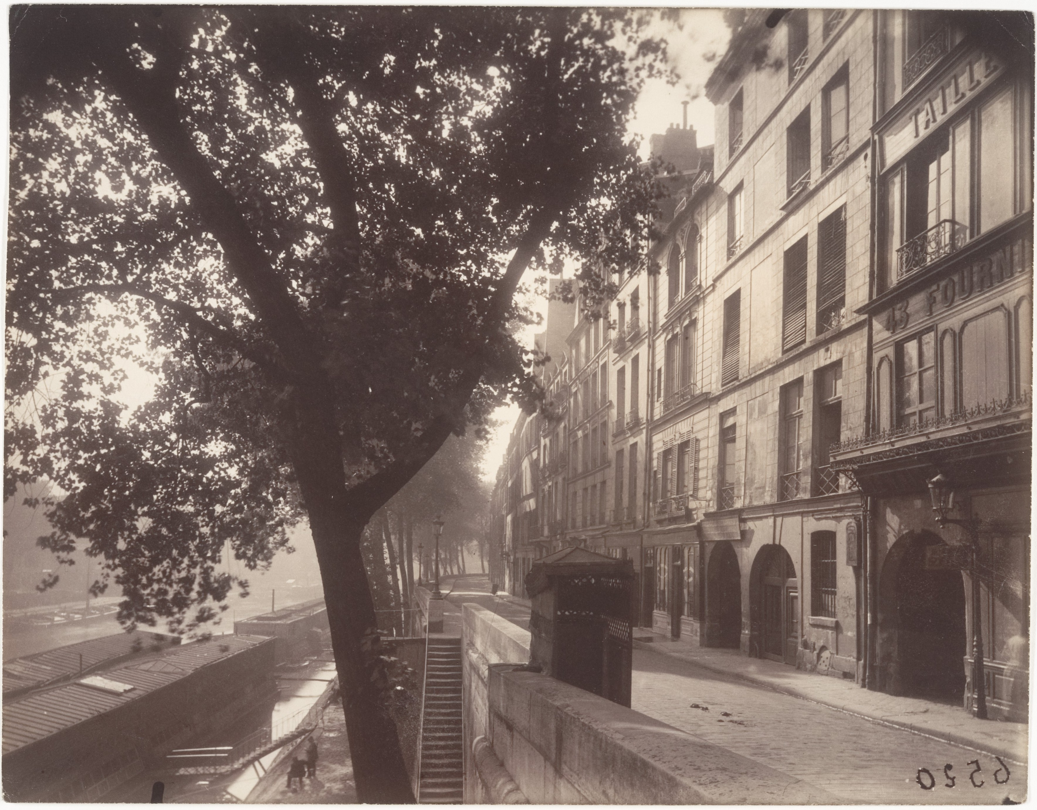 Quai d'Anjou, 6h du matin